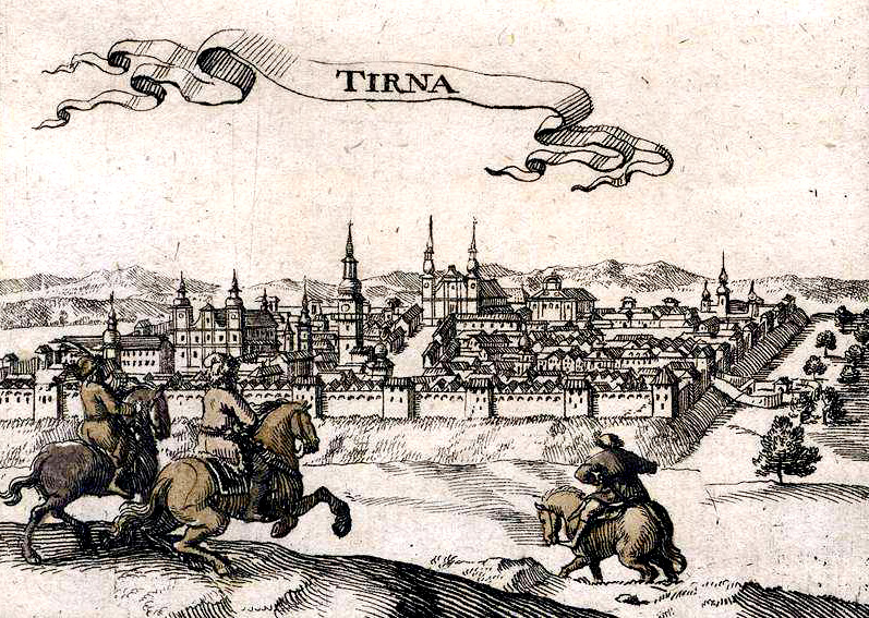 Trnava in Slovakai from book round 1600